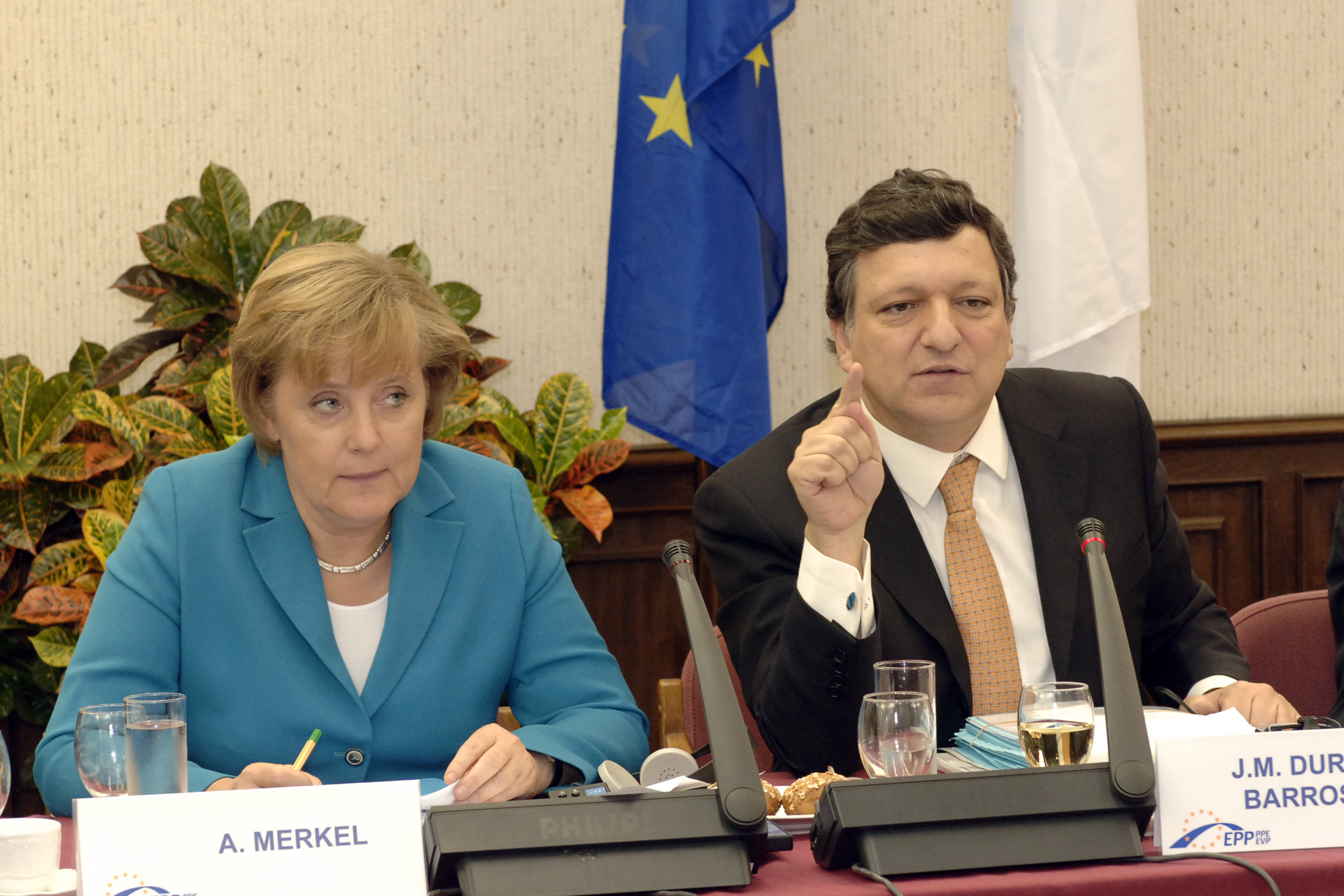 EPP Sumiit 15 May 2006